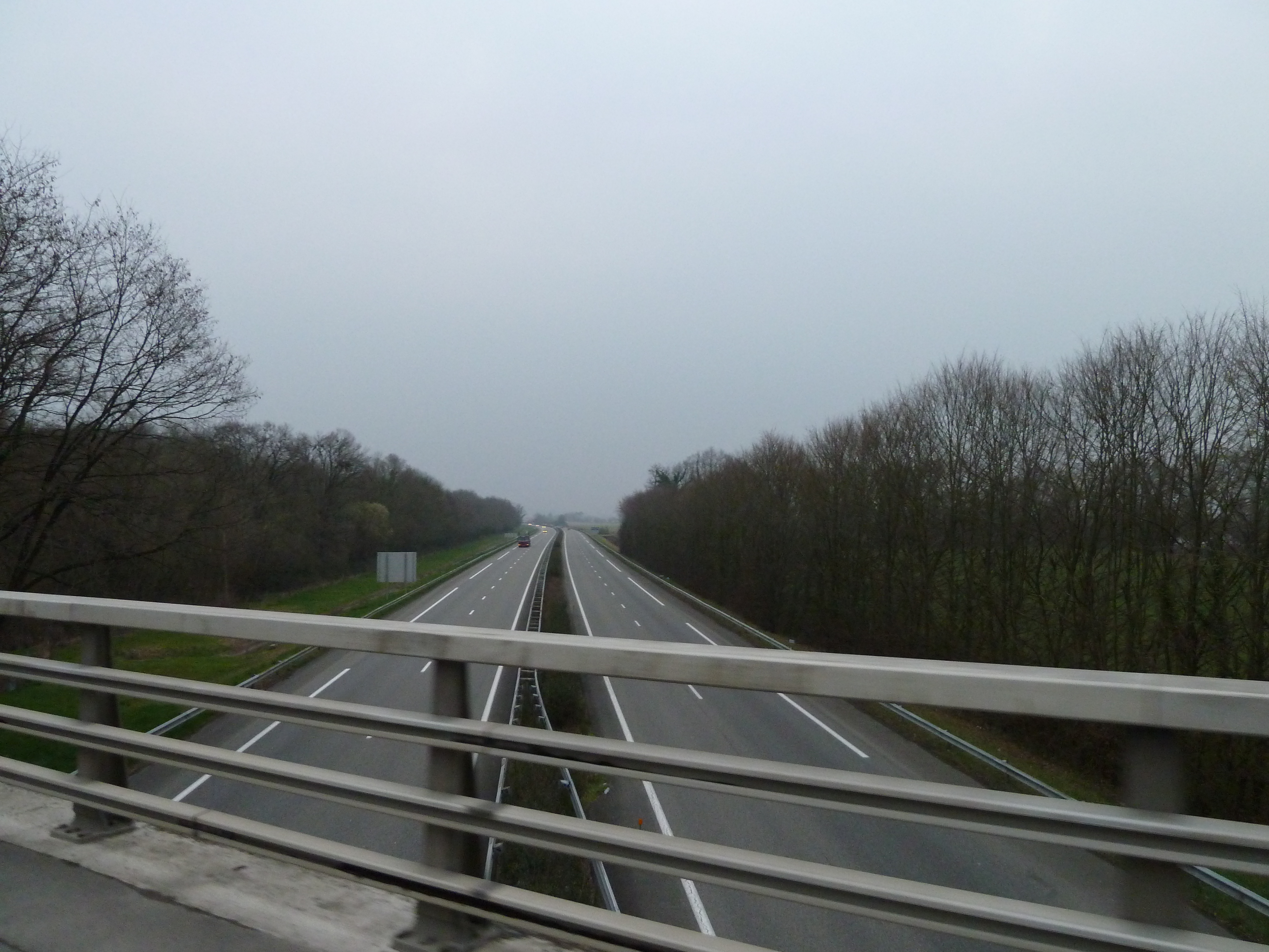 A 64 depuis le pont de Berlanne le 24 mai 2010.